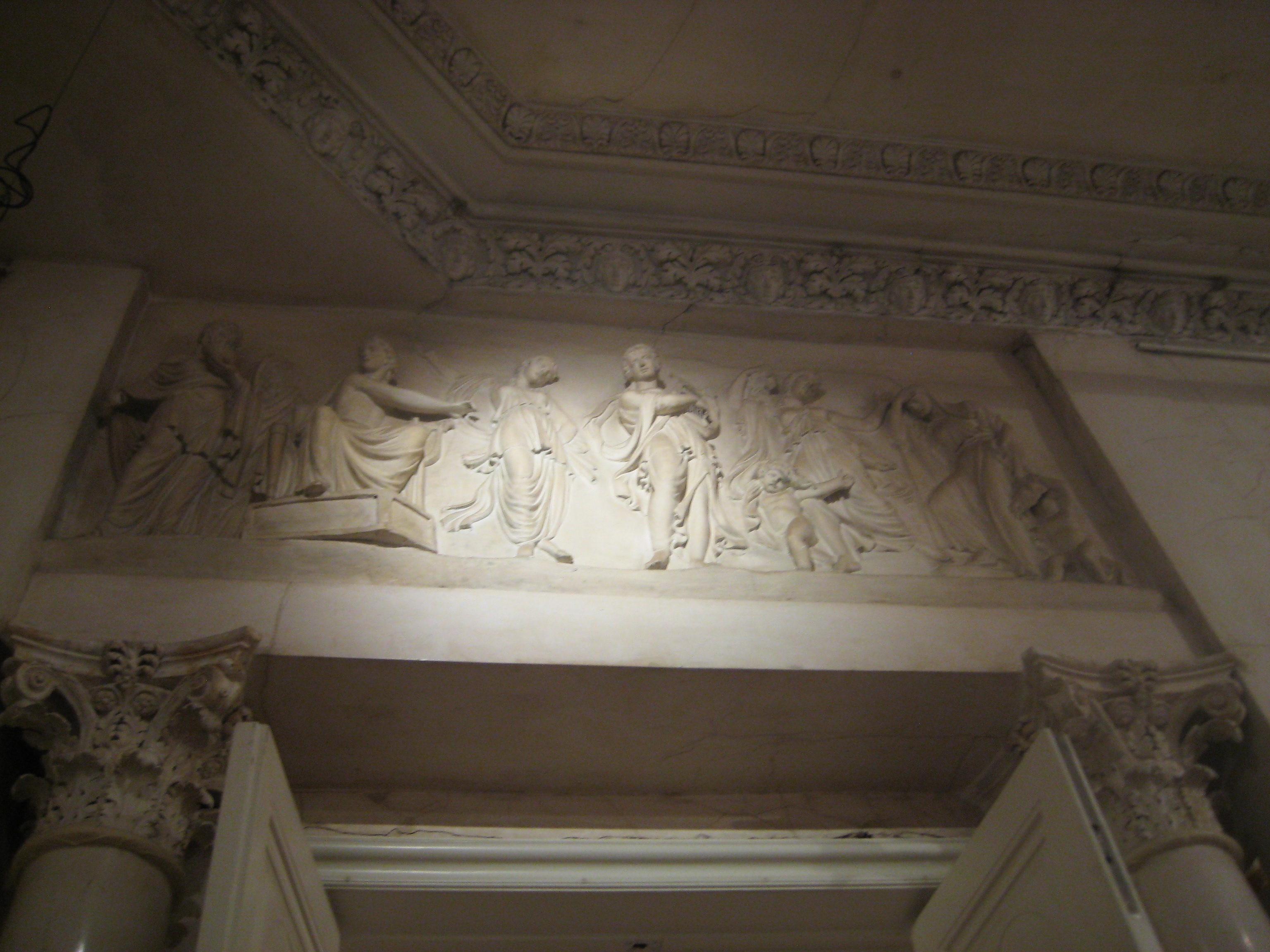 МУАР